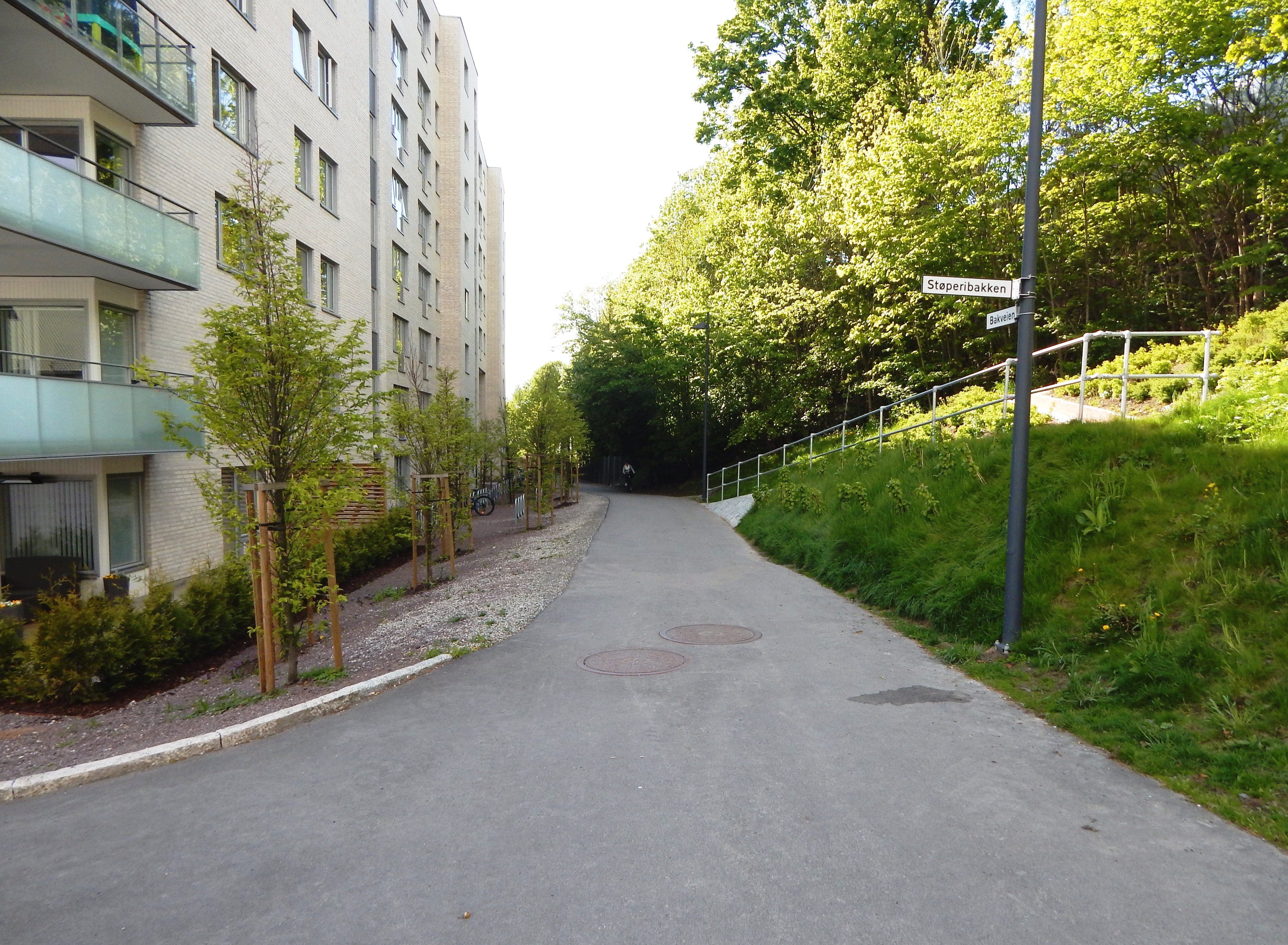 Bakveien går vestover fra Støperibakken, bak bebyggelsen i Kværnerbyen